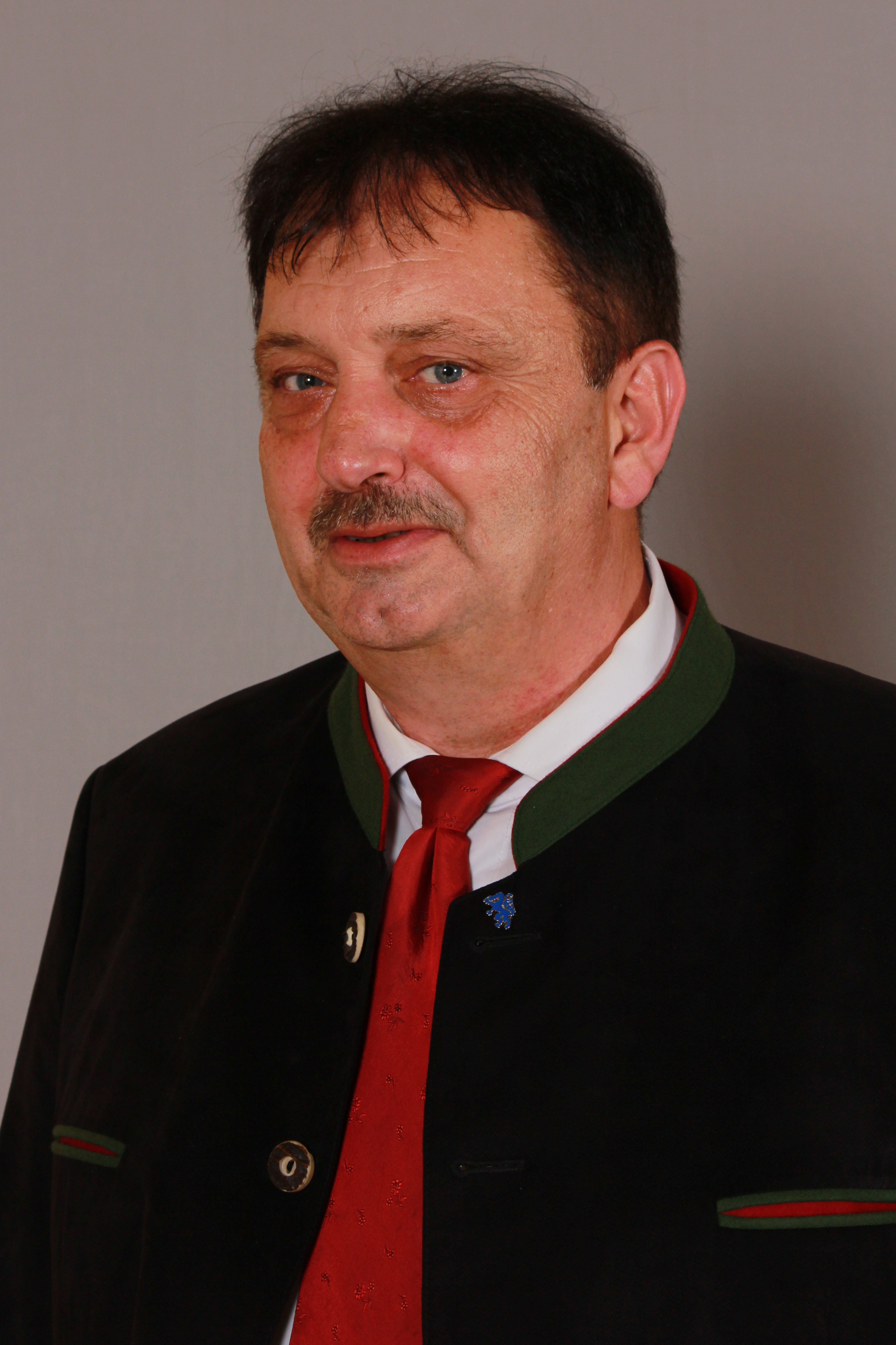 Anton Kogler, Abgeordneter zum Steiermärkischen Landtag